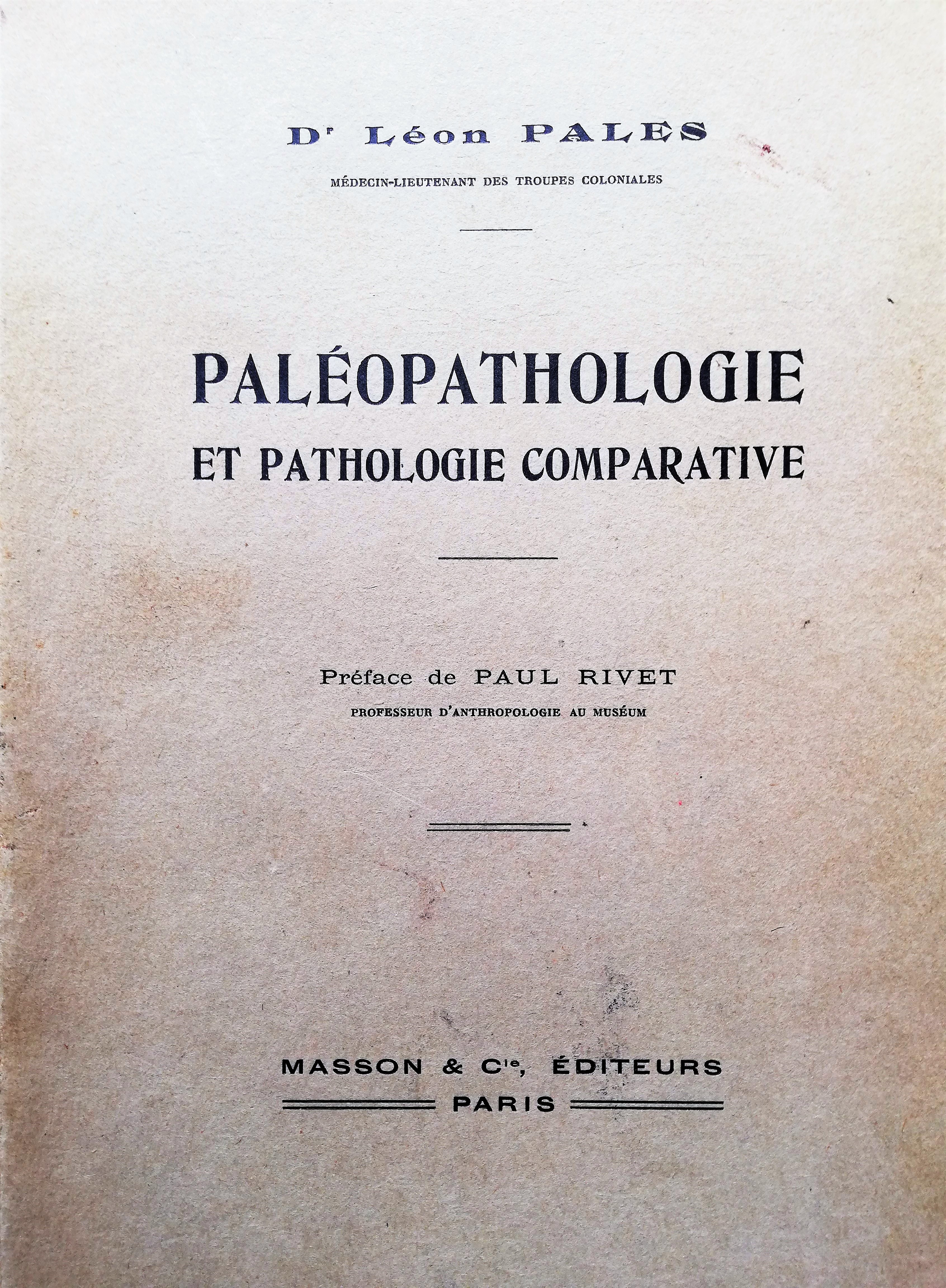 Couverture beige d'un livre de 1930